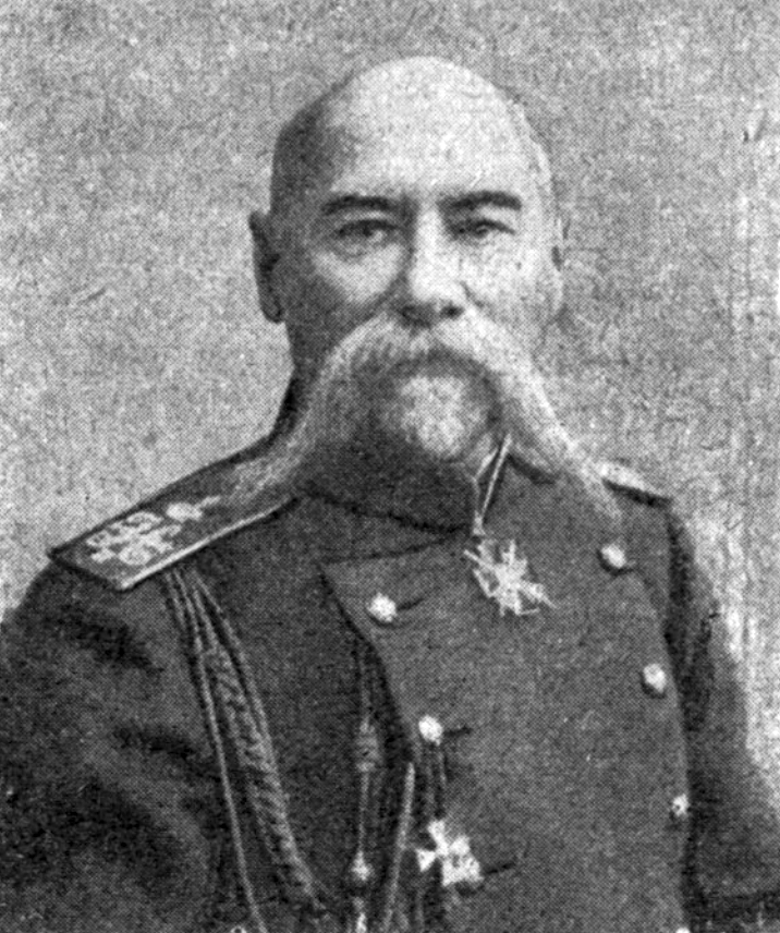 Владимир Николаевич Данилов (1852—1914) — генерал-адъютант, генерал от инфантерии, герой русско-японской войны.